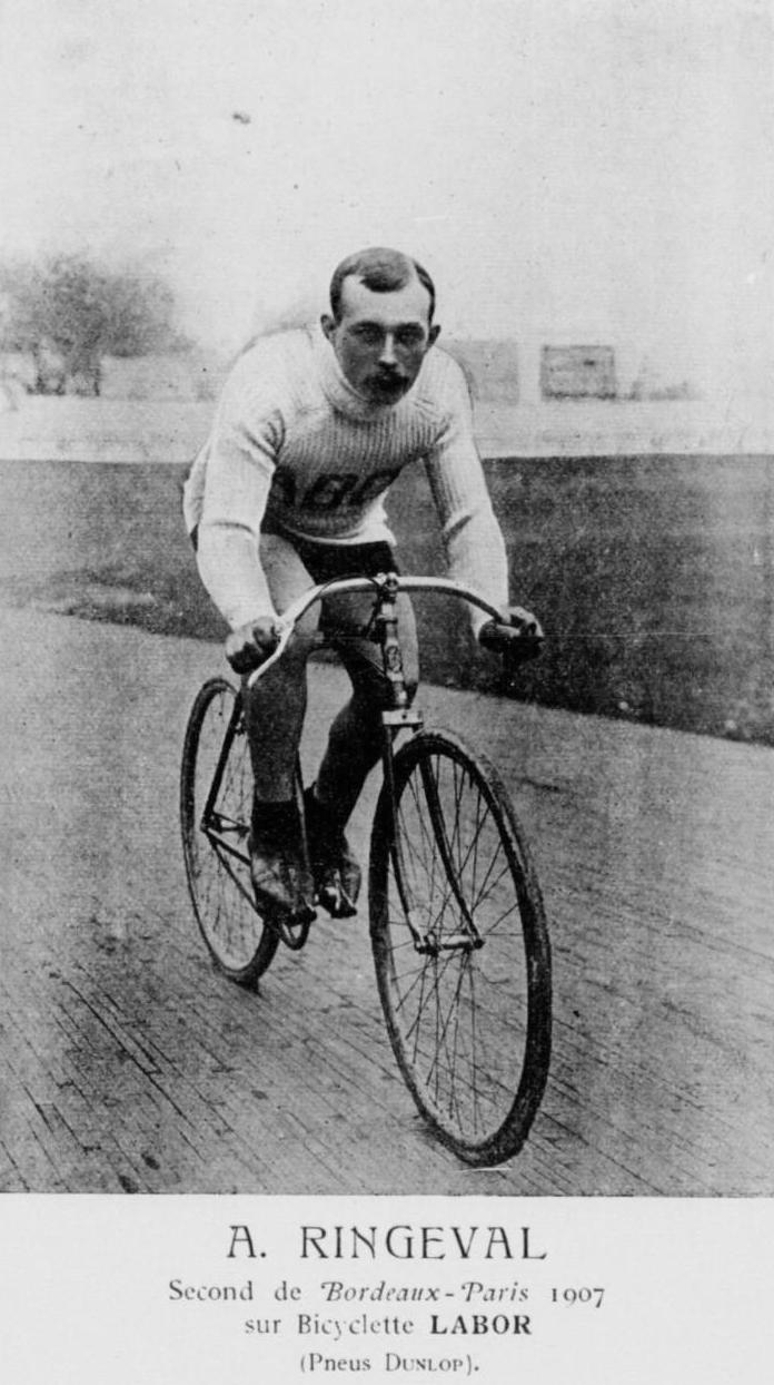 Augustin Ringeval - Labor. Illustration issue de : Alphonse Baugé (préf. Oscar Méténier), Le Tour de France, 1907 : lettres à mon directeur, Paris, Librairie de L'Auto, 1908, 123 p.